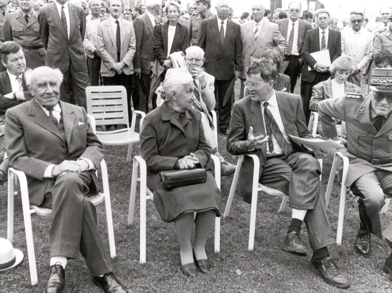 Von links: Prof. Edgar Bonjour, Prof. Jeanne Hersch, Bundesrat Kaspar Villiger und Korpskomandant Rolf Binder.„DIAMANT“- Wanderausstellung „Schweiz 1939 – 1945 in Spiez eröffnet.